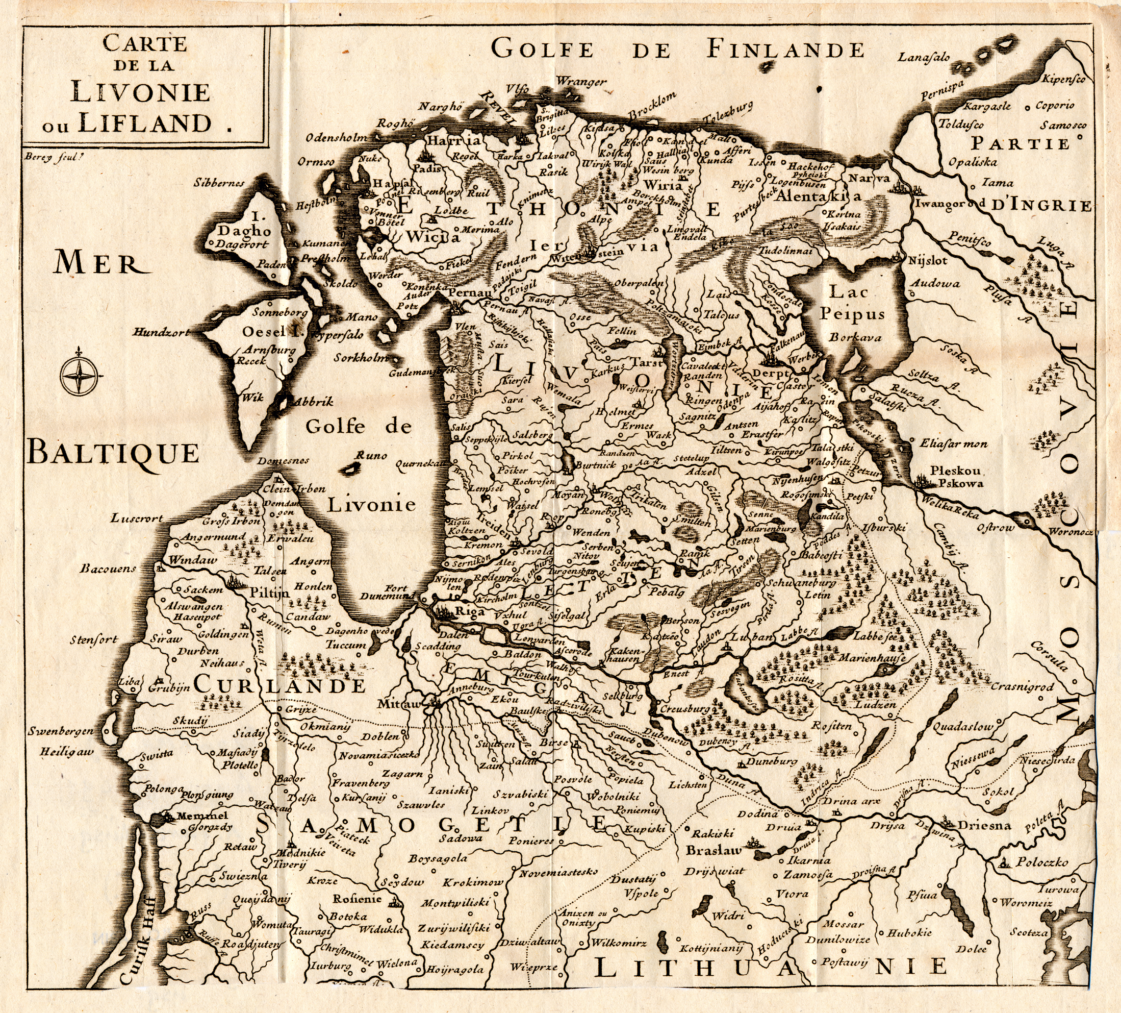 Carte de la Livonie ou Lifland Published in: Relation du voyage d’Adam Olearius en Moscovie, Tartarie et Perse : Tom I, part 1 in Paris. Copper engraving, 28 x 28 cm.